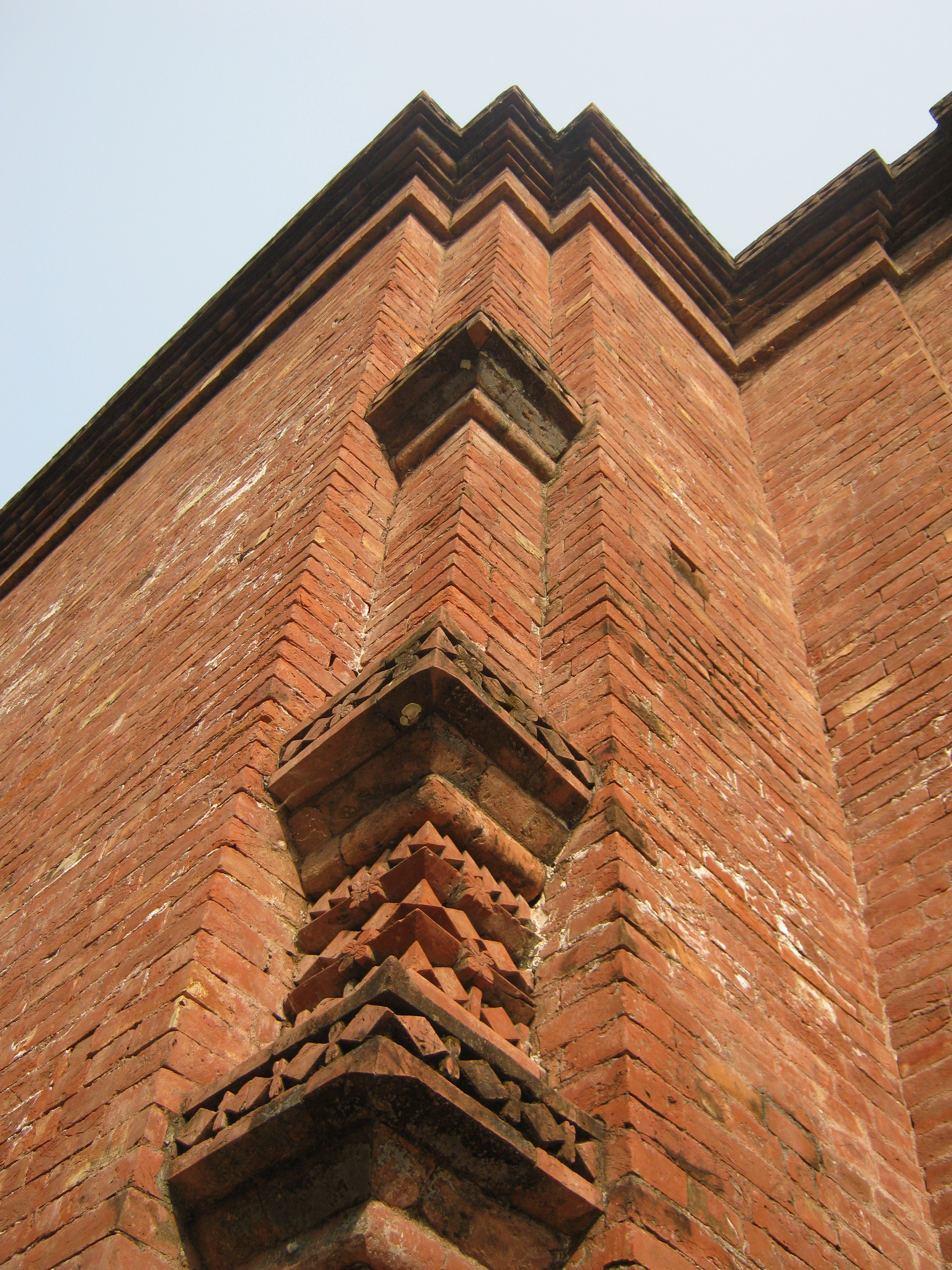 ষাট গম্বুজ মসজিদ